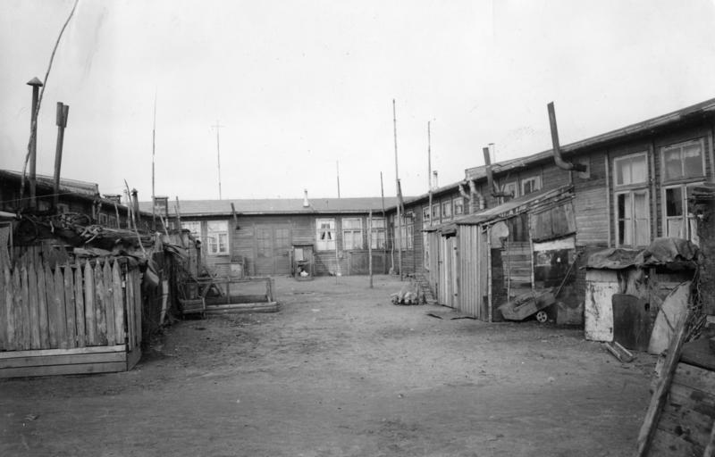 Flüchtlingsbaracken bei Eckernförde In solchen Elendsbaracken fanden die Heimatvertriebenen nach dem Zusammenbruch zunächst Zuflucht